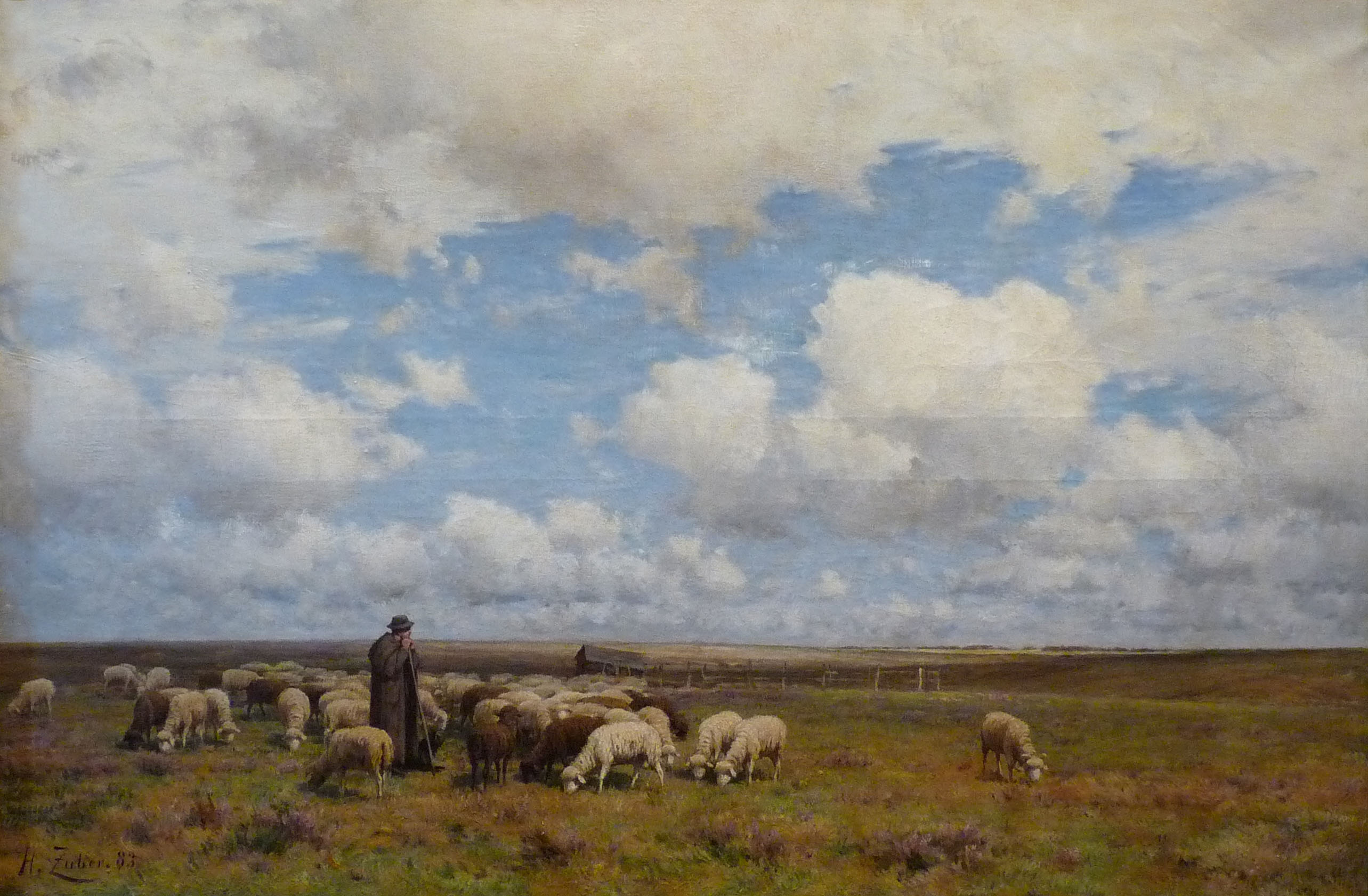 Le Troupeau de Vieux-Ferrettetitle QS:P1476,fr:"Le Troupeau de Vieux-Ferrette" label QS:Lfr,"Le Troupeau de Vieux-Ferrette"